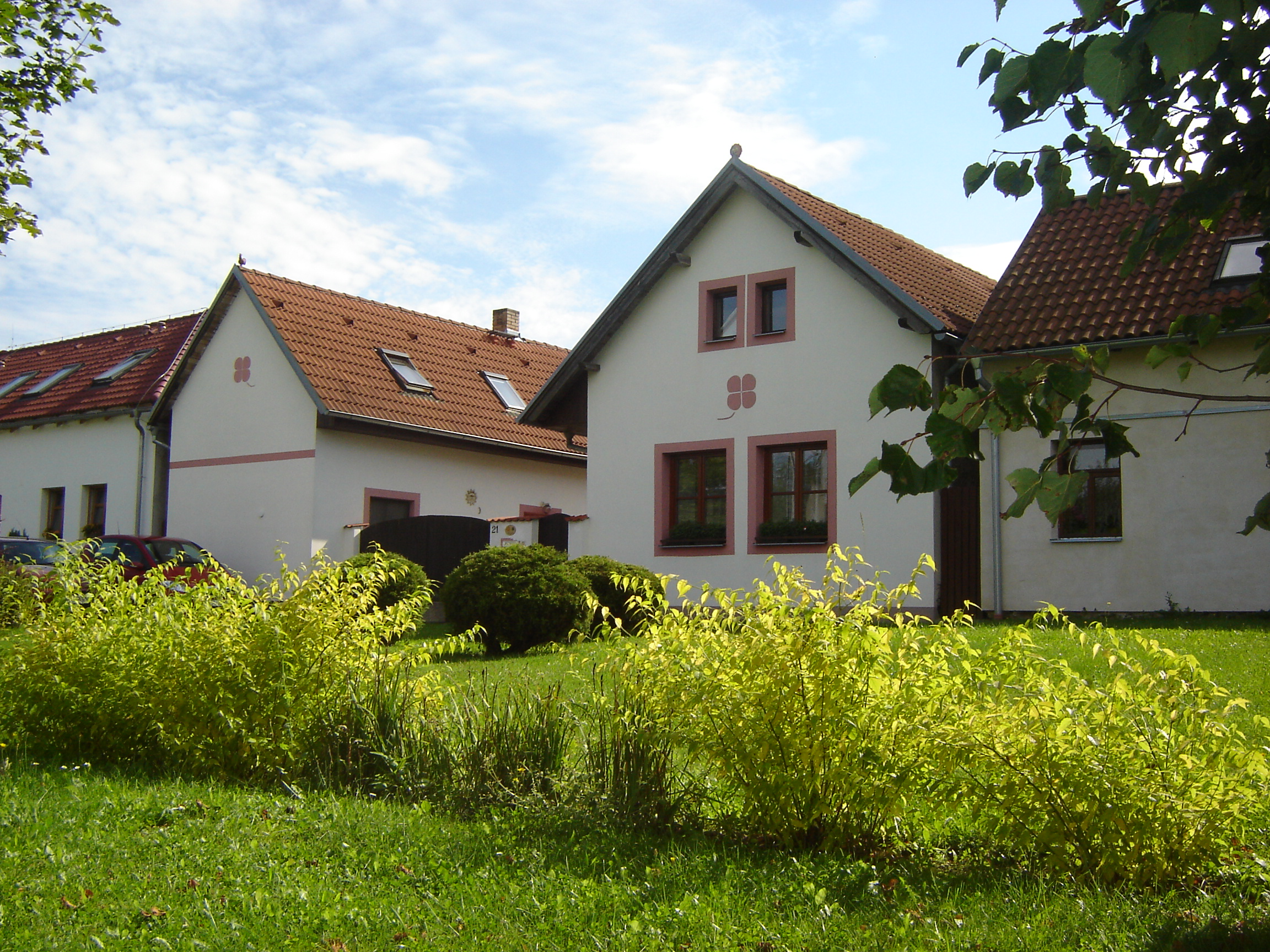 jihočeská stavení